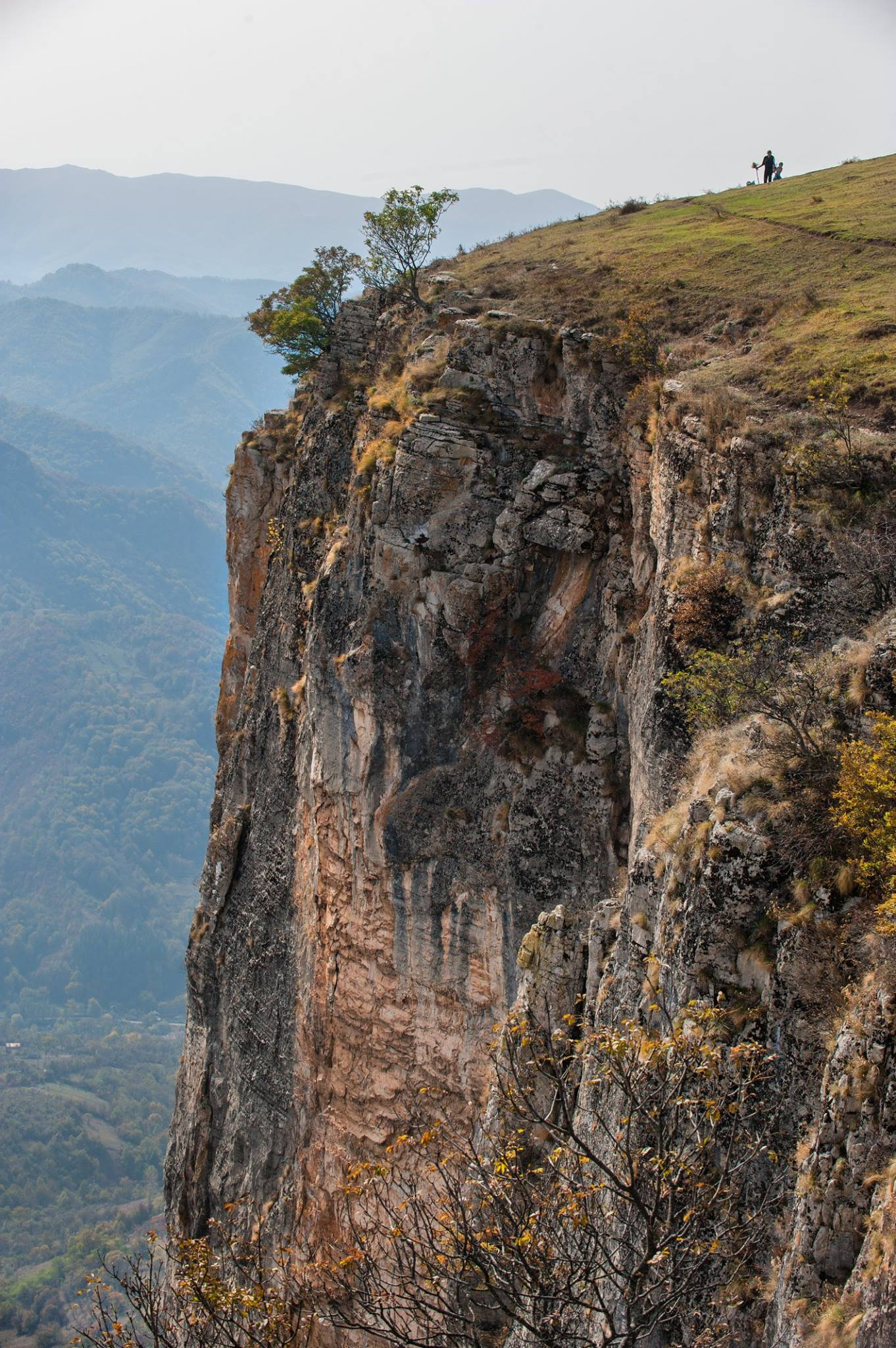 Тетевенски Балкан